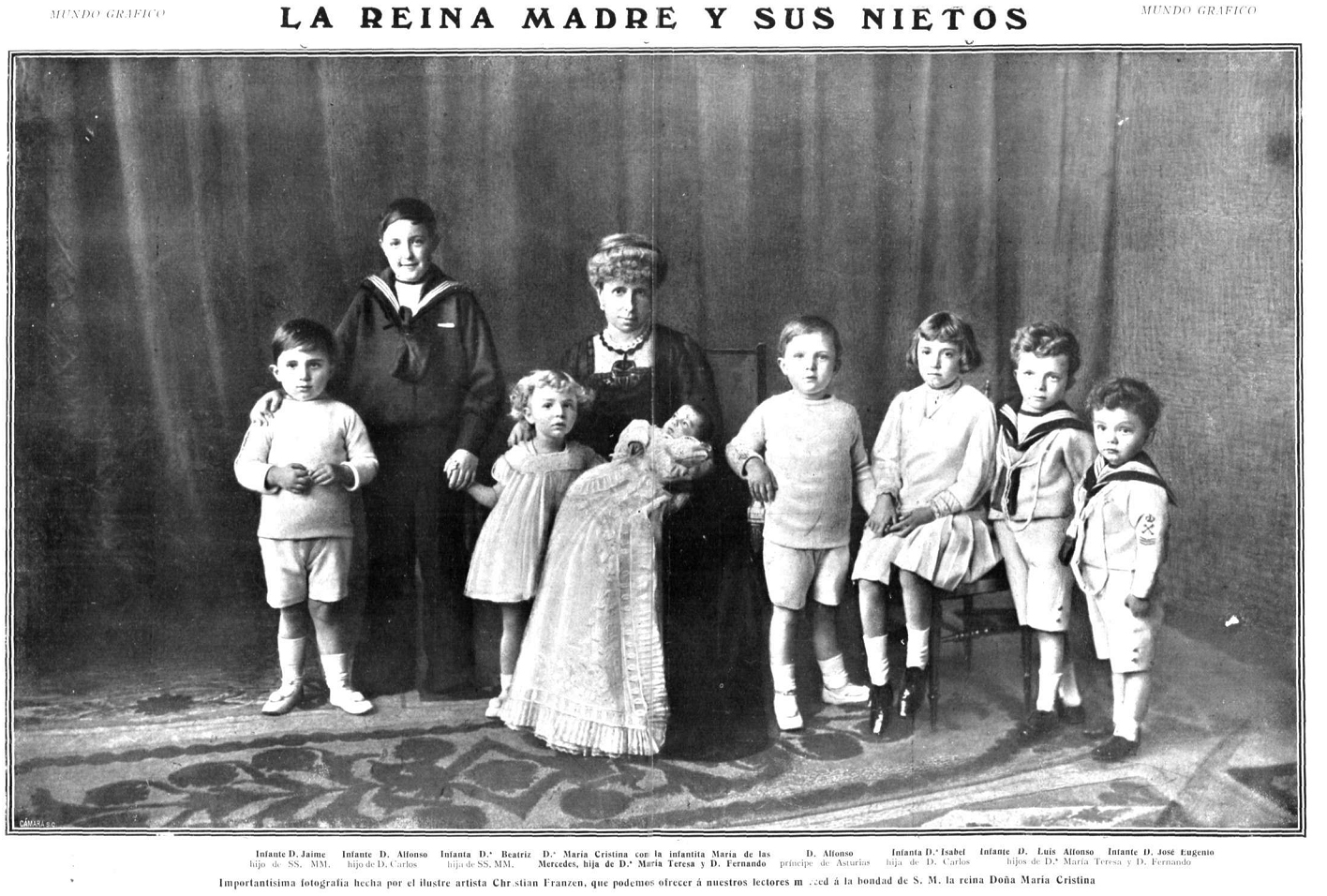 Retrato de María Cristina de Habsburgo-Lorena, obra del fotógrafo Christian Franzen, recogido en la revista española Mundo gráfico.